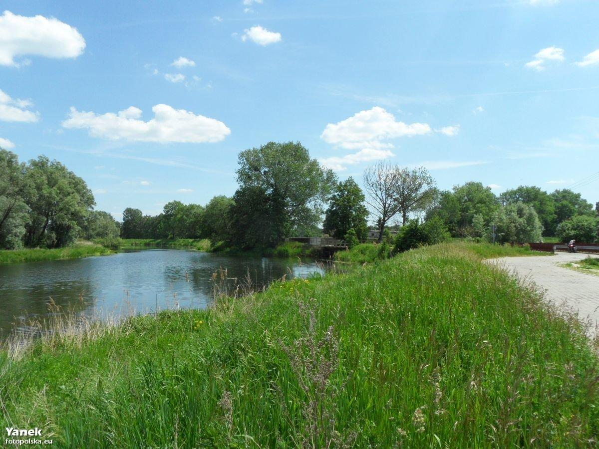 Gdańsk. Motława przy ujściu Raduni (nie kanału Raduni a rzeki) oraz Czarnej Łachy. Z prawej widoczny mostek nad Radunią, dalej nieco w lewo, drewniany most nad Czarną Łachą.